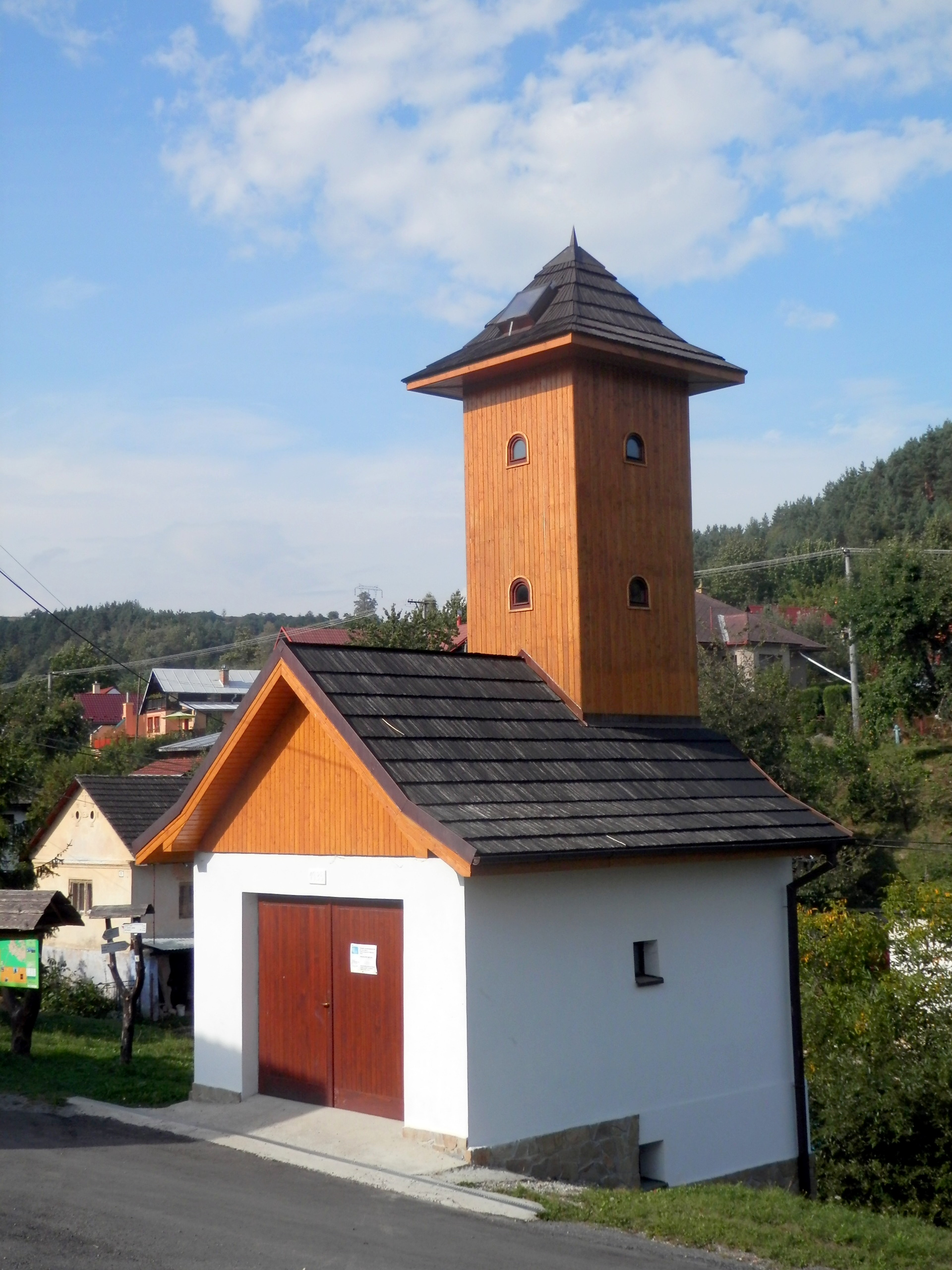 Zrekonštruovaná hasičská stanica. Obec Klenov, okres Prešov.